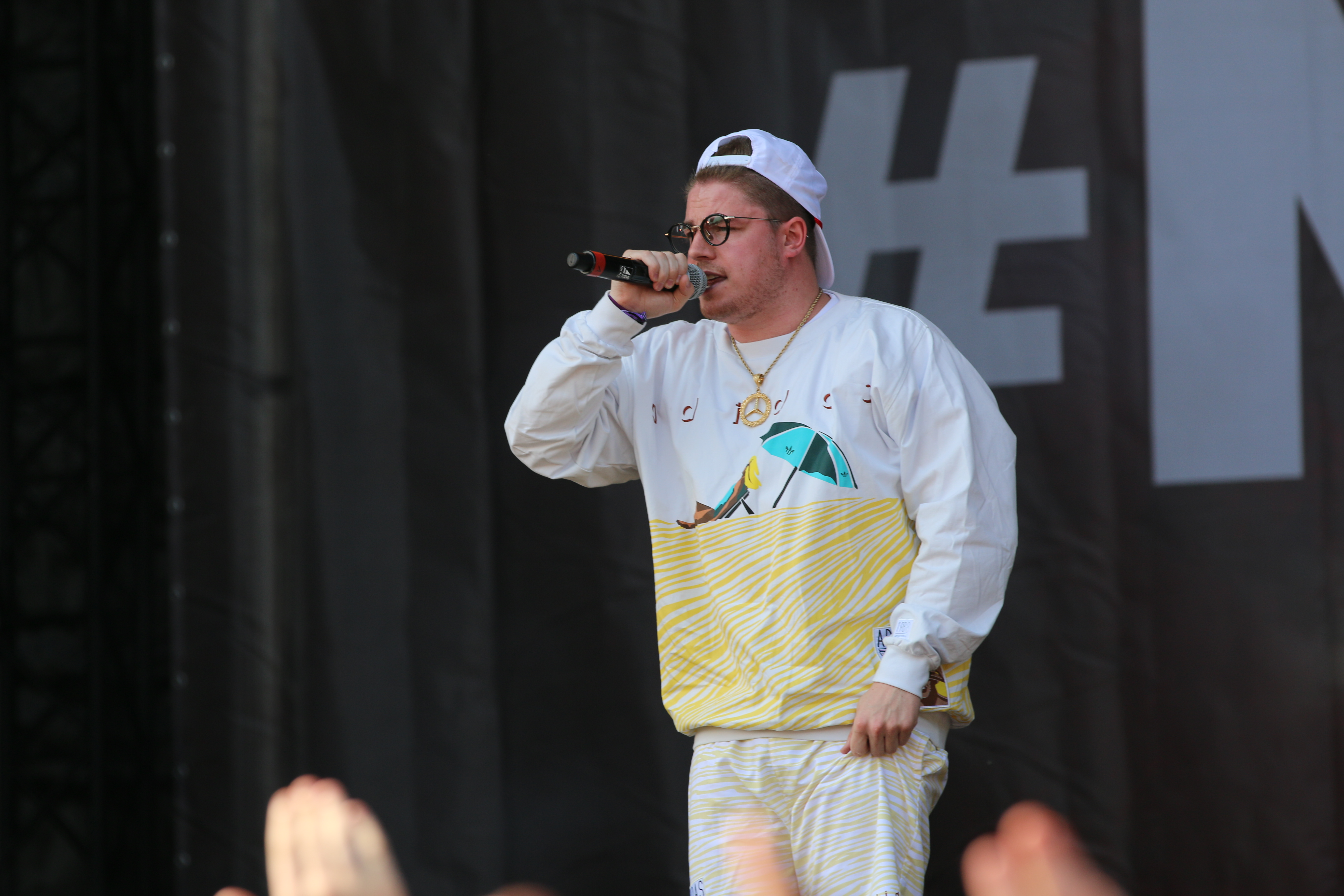 DCVDNS